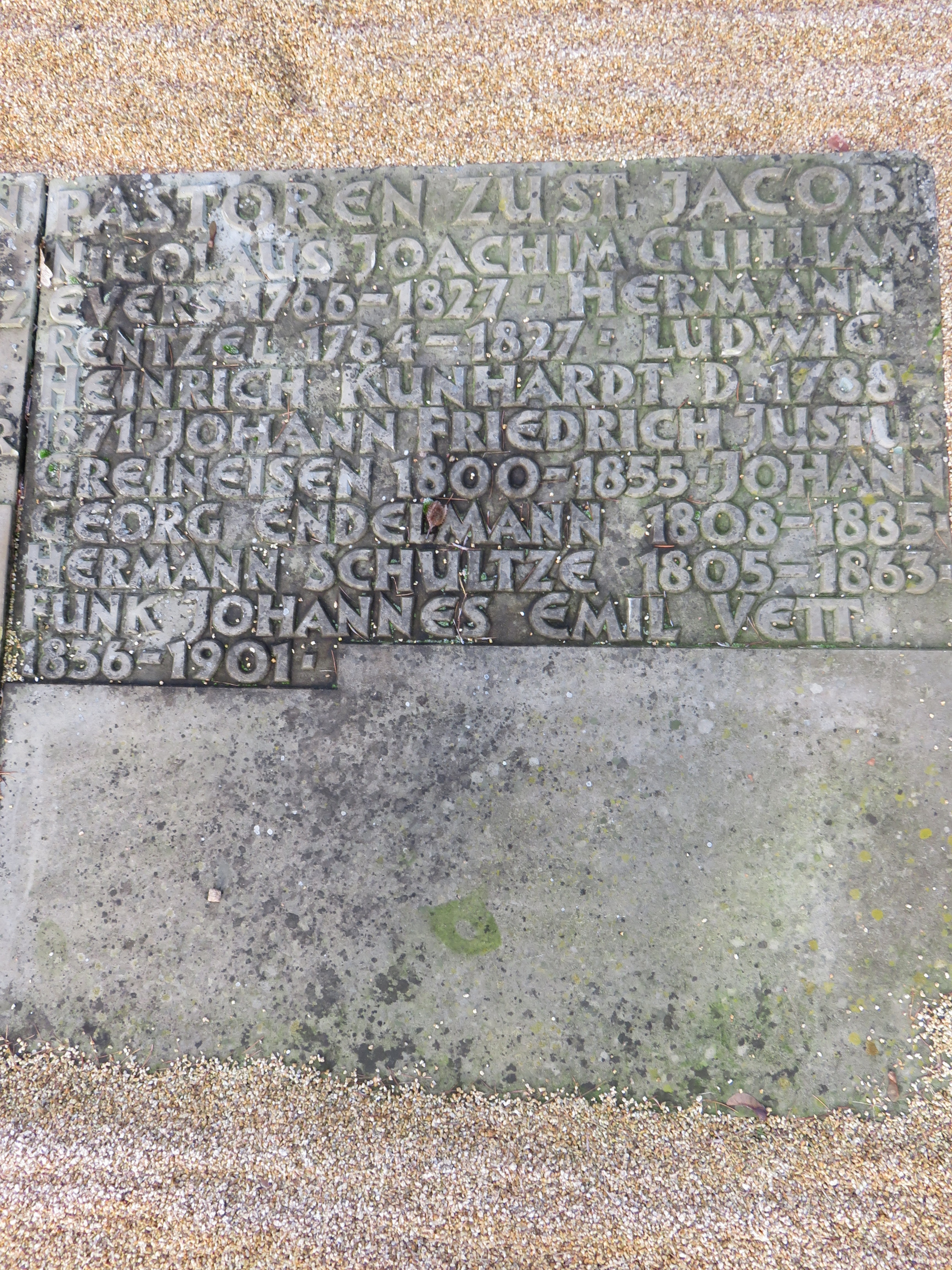 Doppelsammelgrab Hauptpastoren zu St. Jacobi / Pastoren zu St. Jacobi im Bereich des Althamburgischen Gedächtnisfriedhofs auf dem Hamburger Friedhof Ohlsdorf zu Ehren von unter anderen Moritz Ferdinand Schmaltz, Georg Heinrich Röpe, Arthur von Broecker, Hermann Rentzel, Ludwig Heinrich Kunhardt.